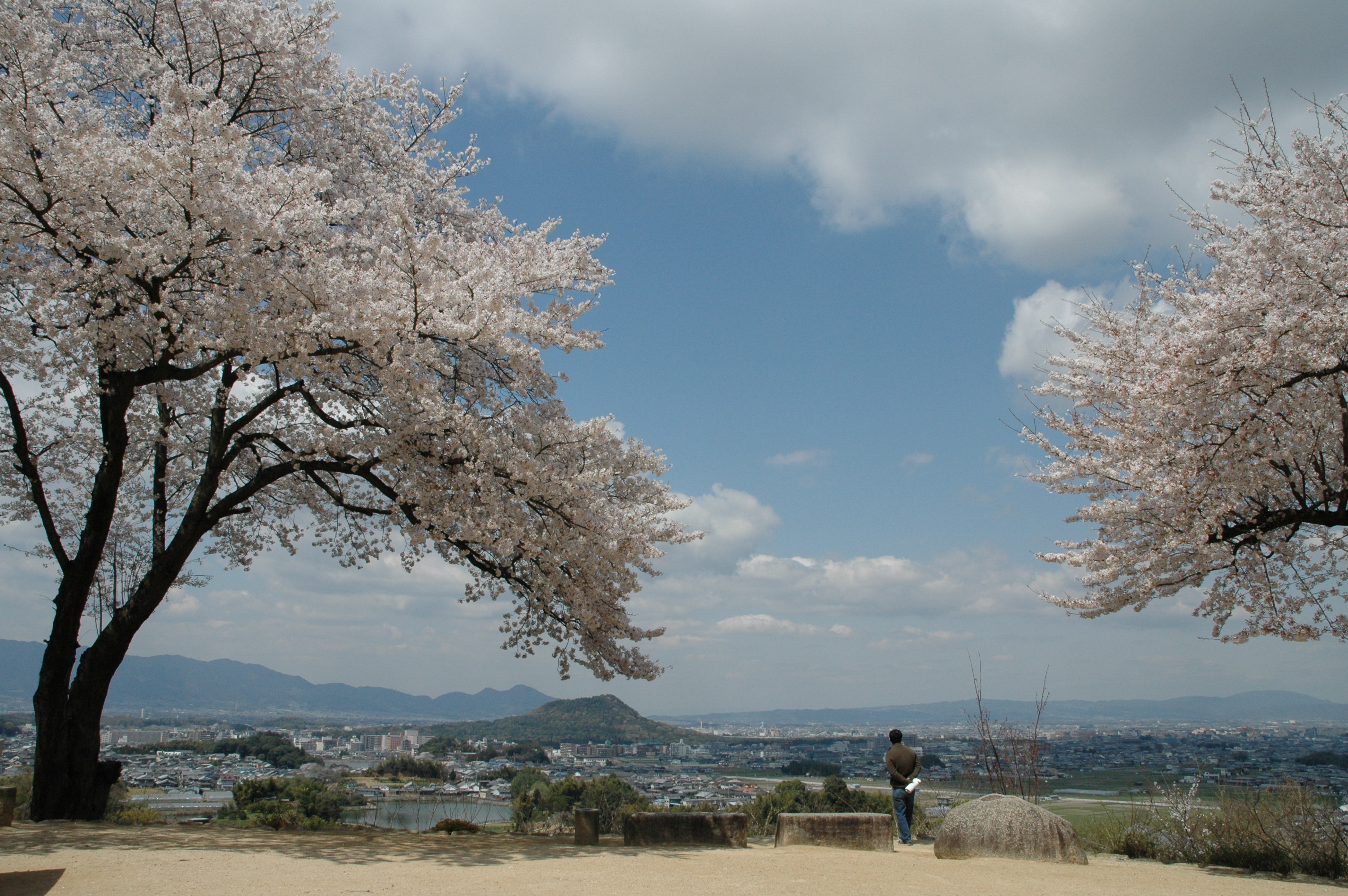 甘樫丘